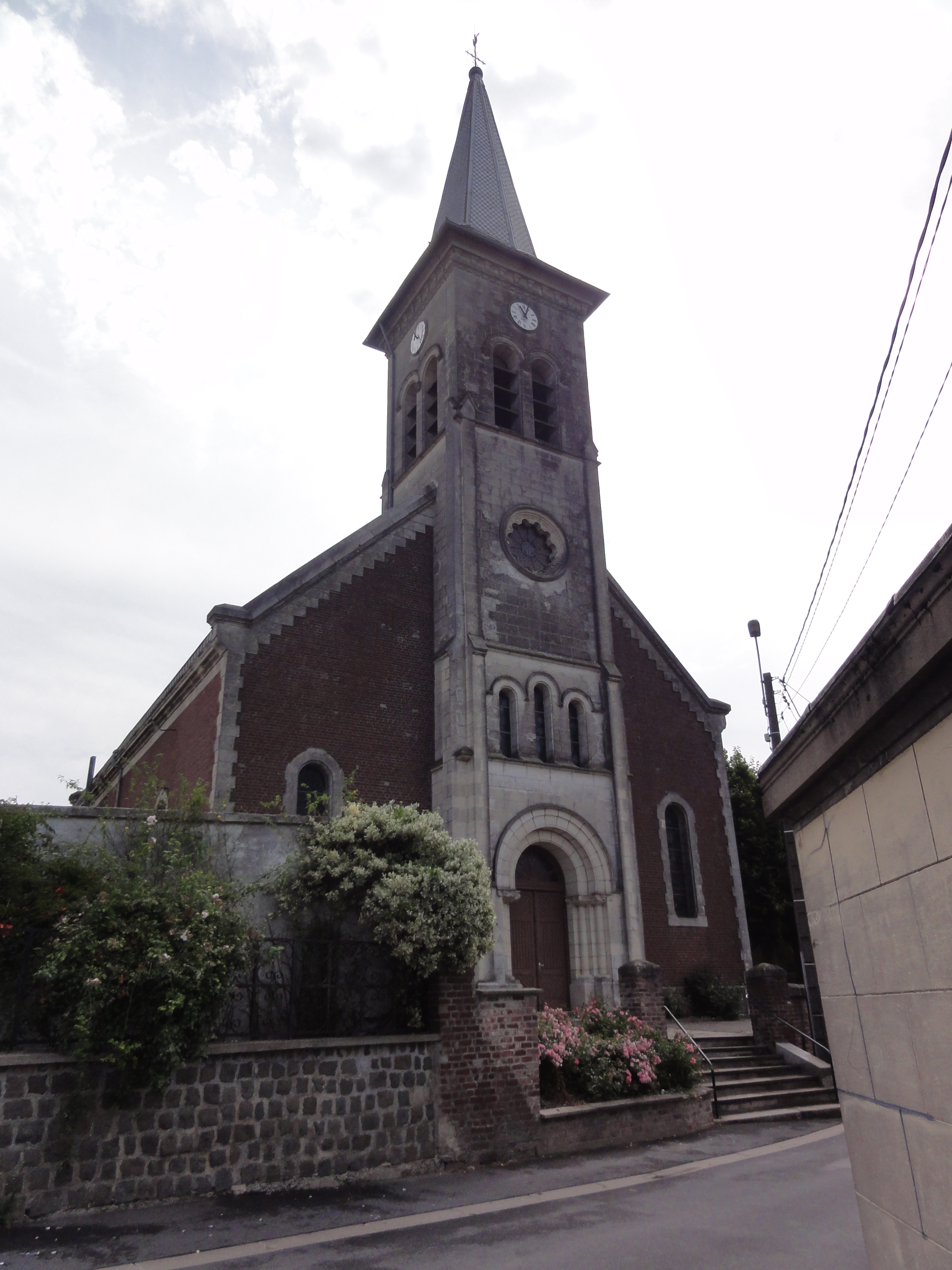 Maresches(Nord,Fr) église, façade